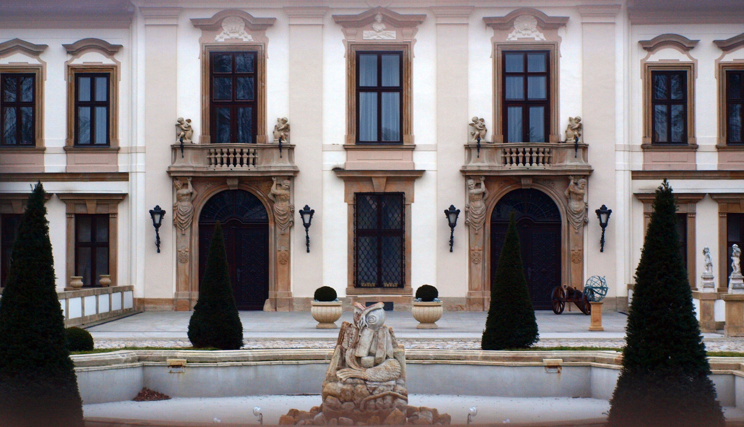 Zámek Koloděje